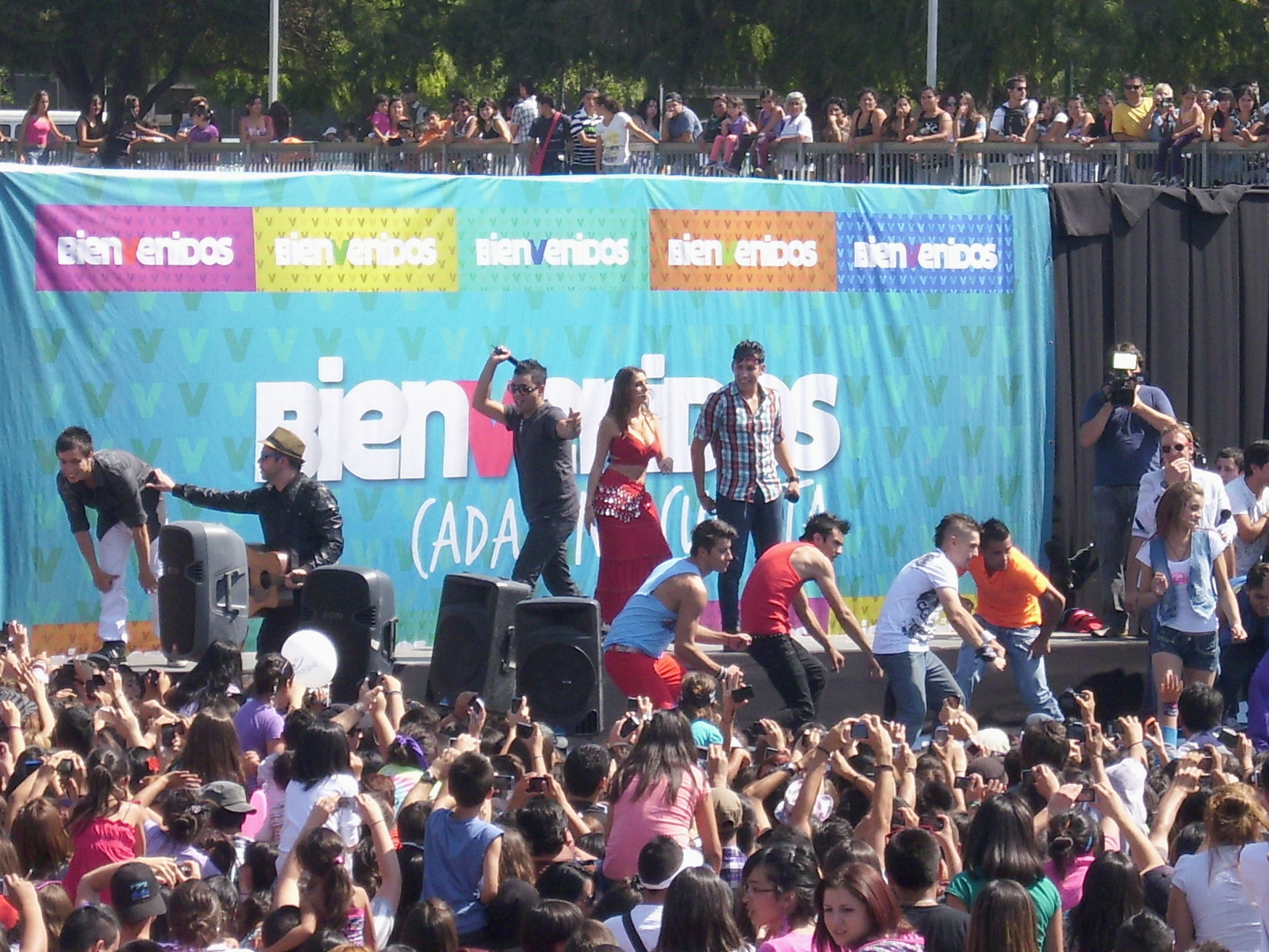 El elenco de la serie Perla, tan real como tú, de Canal 13, durante el lanzamiento del ábum Perla, mi gitano corazón en la Plaza de Armas de Maipú. Santiago de Chile, 9 de febrero de 2012.